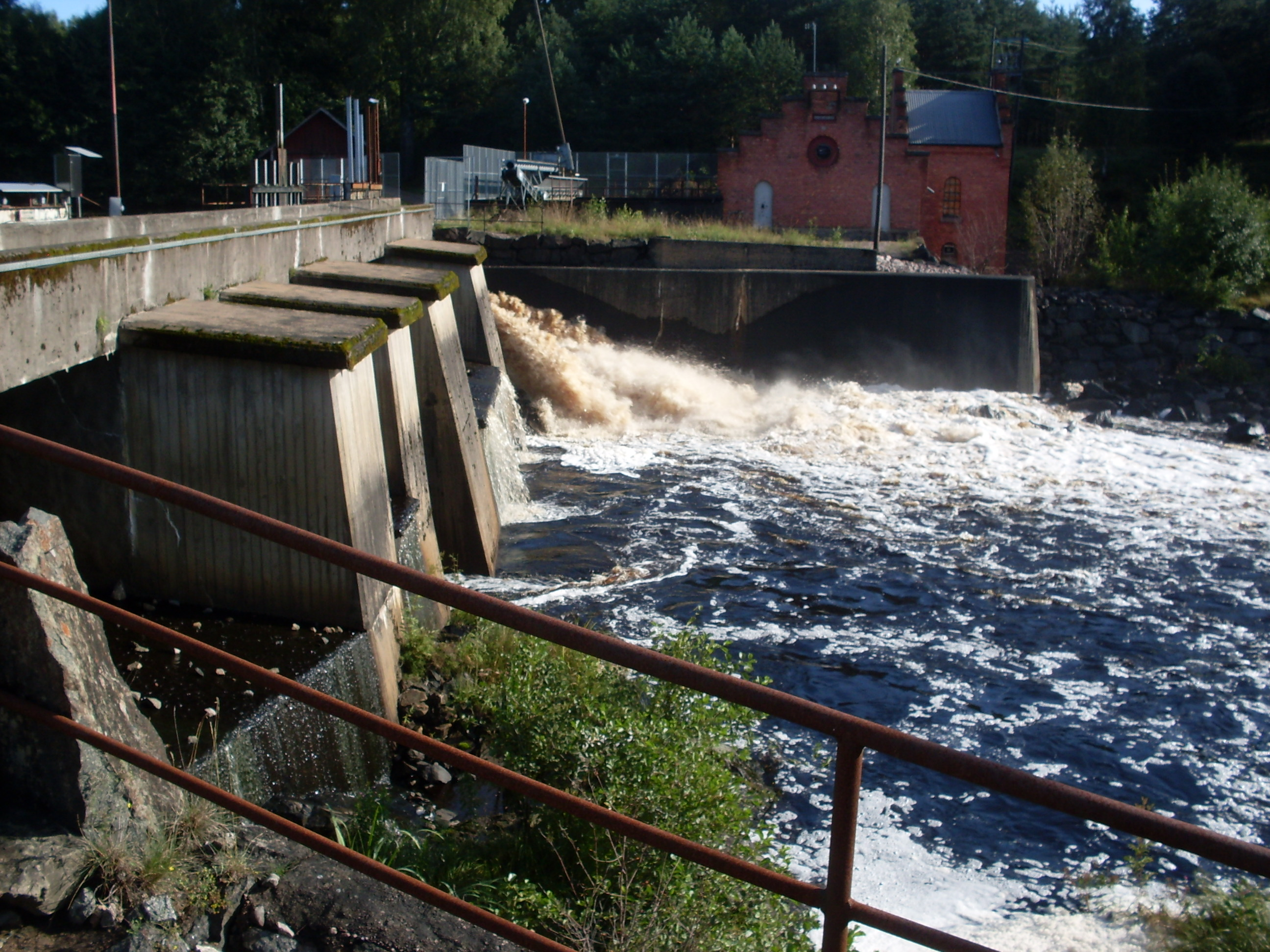 Karlsforsdammen nära Hörle. Härån och Lagan flyter samman här